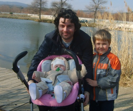 мій чоловік і наші діти